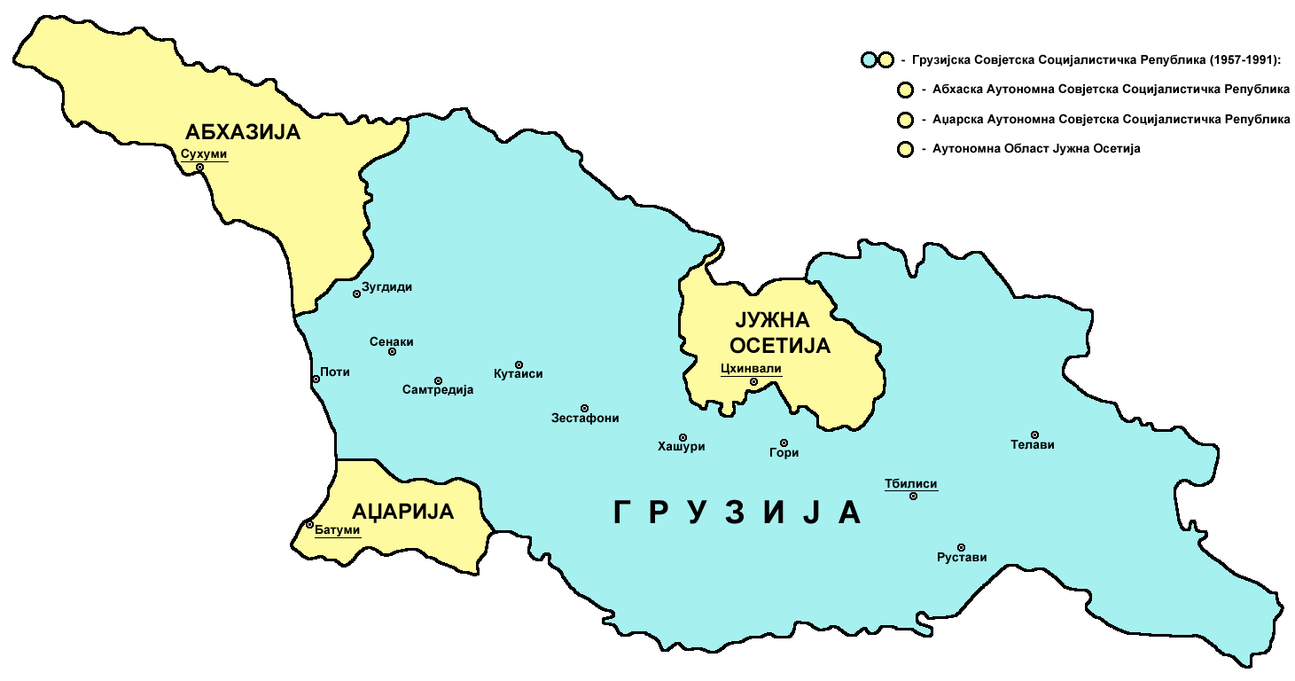 Мапа Грузијске Совјетске Социјалистичке Републике (1957-1991).